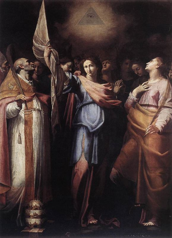 Santa Ursula y sus compañeras, San Marco, Roma